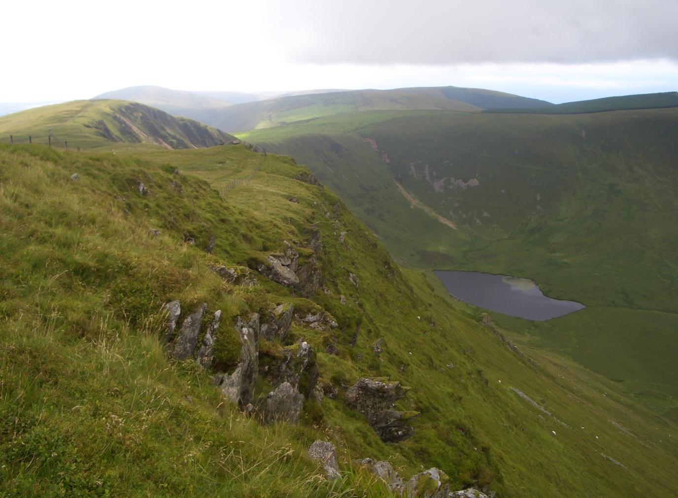 craig-y-llyn